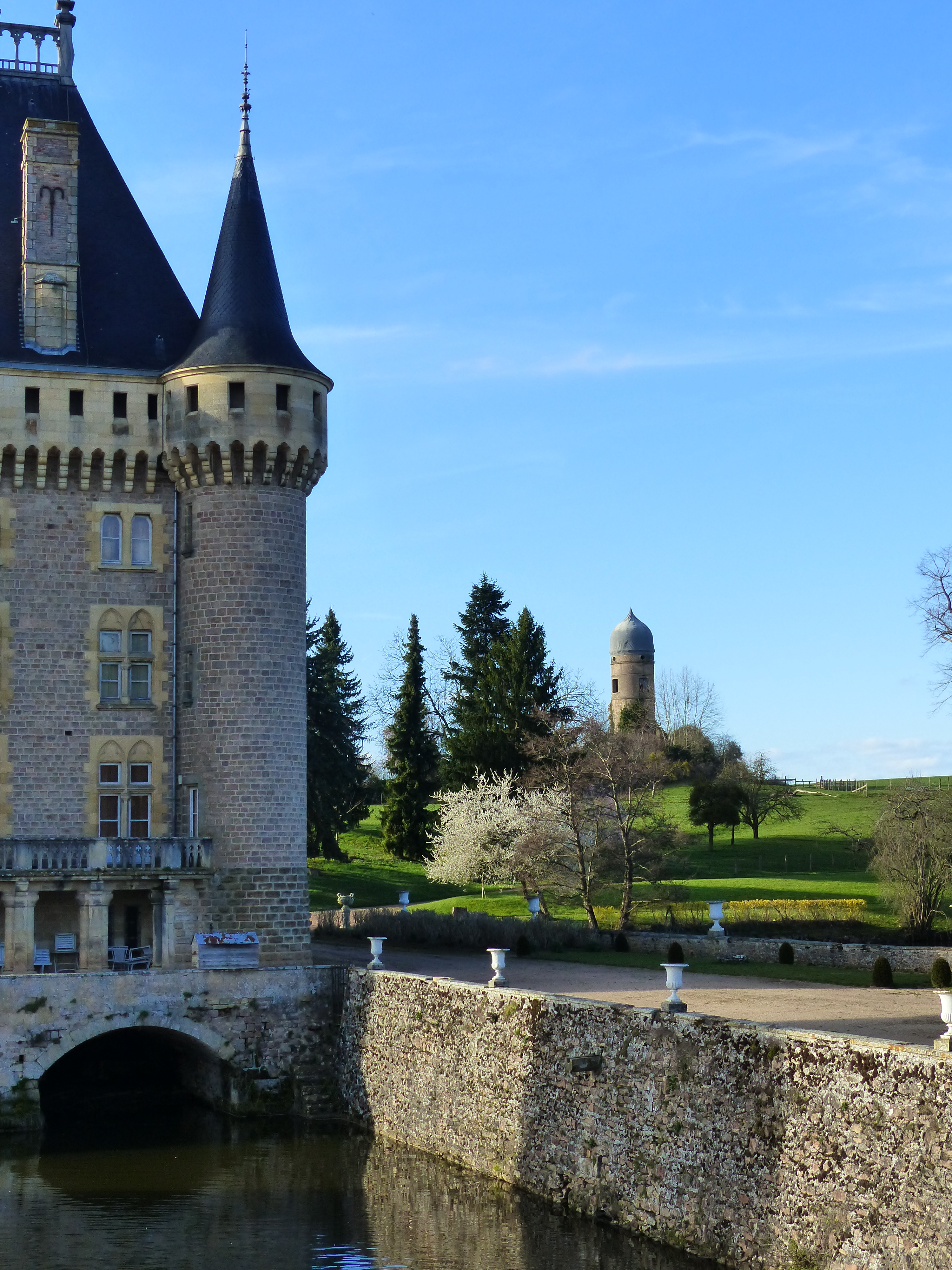 Tour du guet du Château de La Clayette